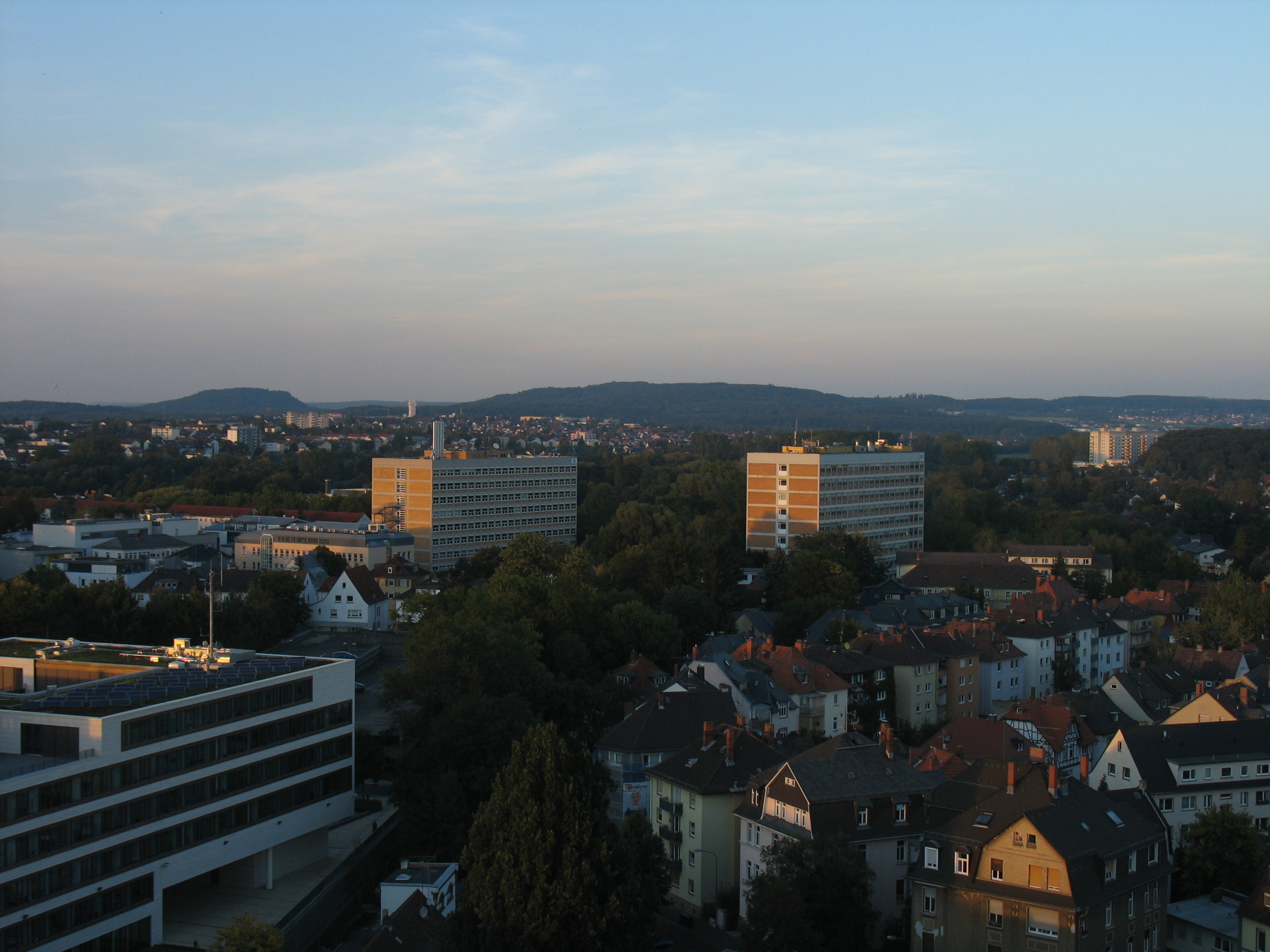 Lollarkopf (281 m) und Hangelstein (305 m) im Südwesten des Vorderen Vogelsberg vom Gießener Dachcafe am Ludwigsplatz aus.